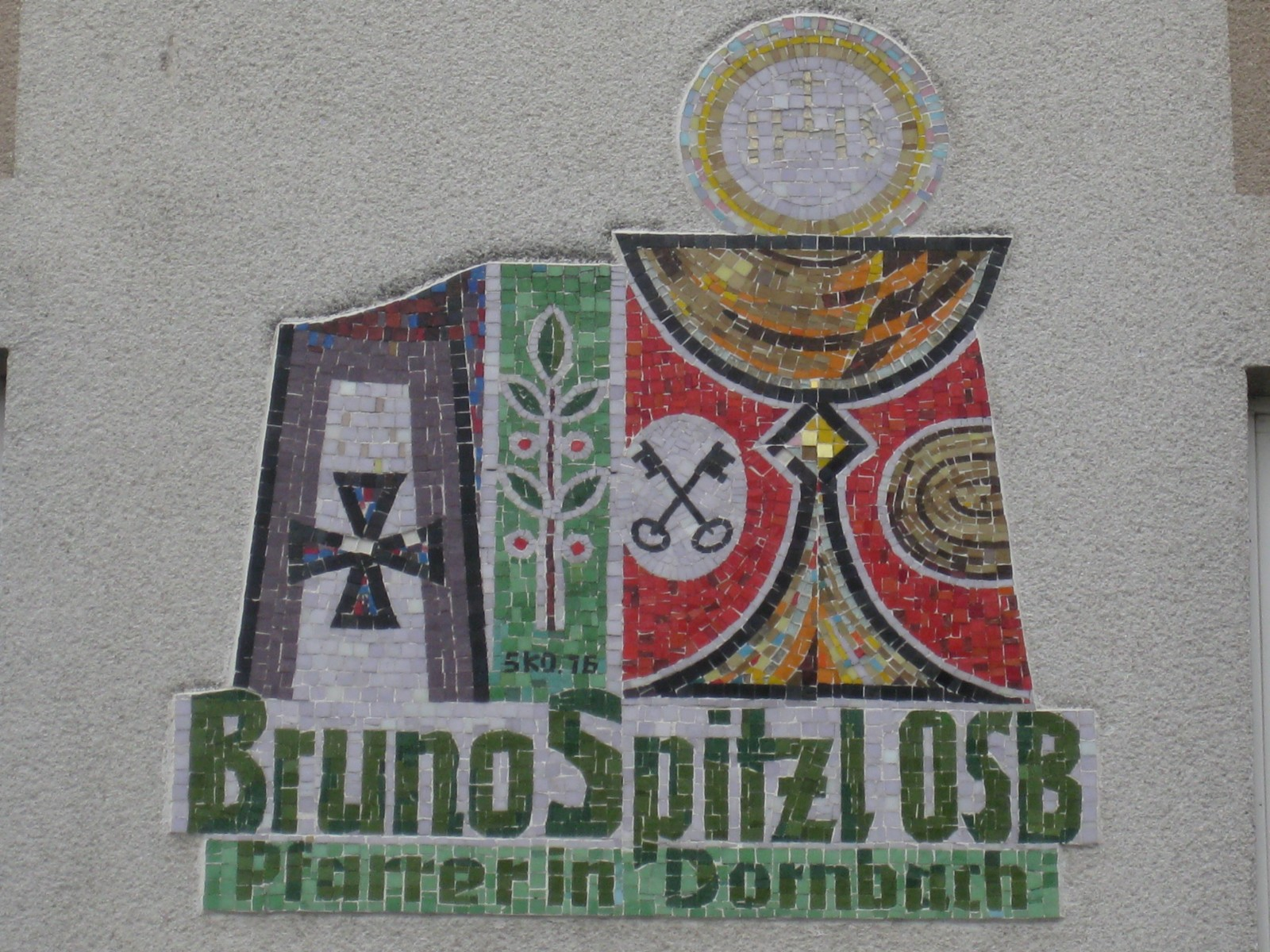 Bruno Spitzl-Gedenkmosaik in der Dornbacher Straße 41, Wien-Hernals.